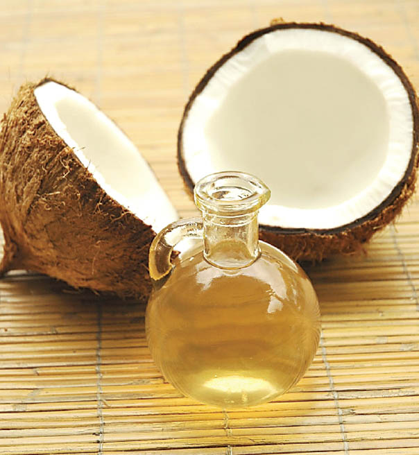 Dầu dừa